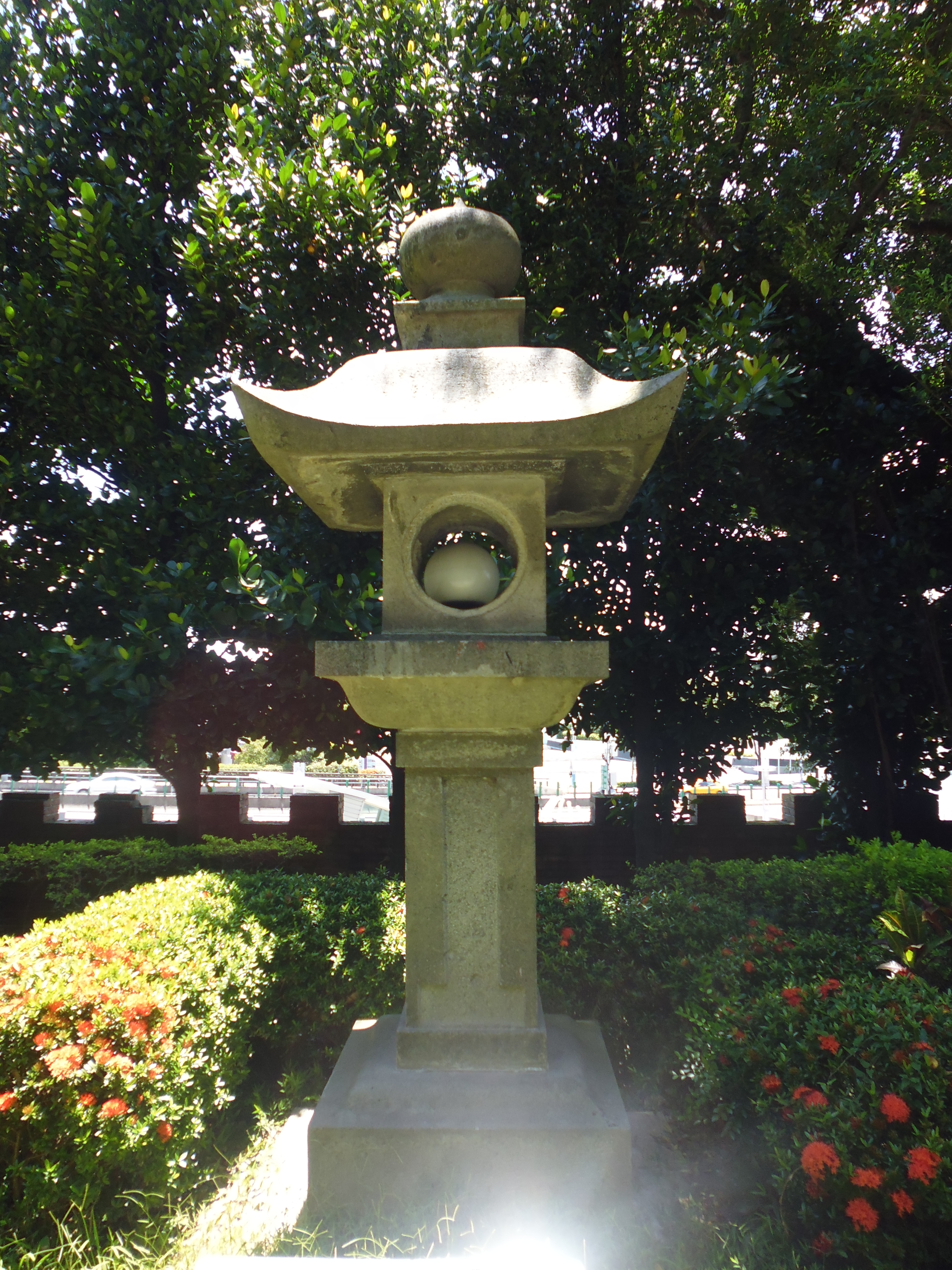 中文（台灣）: zh-TW